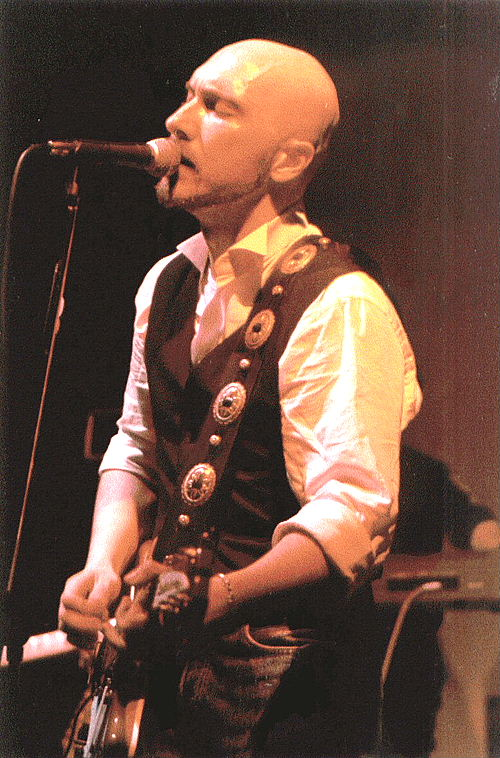 Immagine dell'autore, cantante e musicista genovese Max Parodi